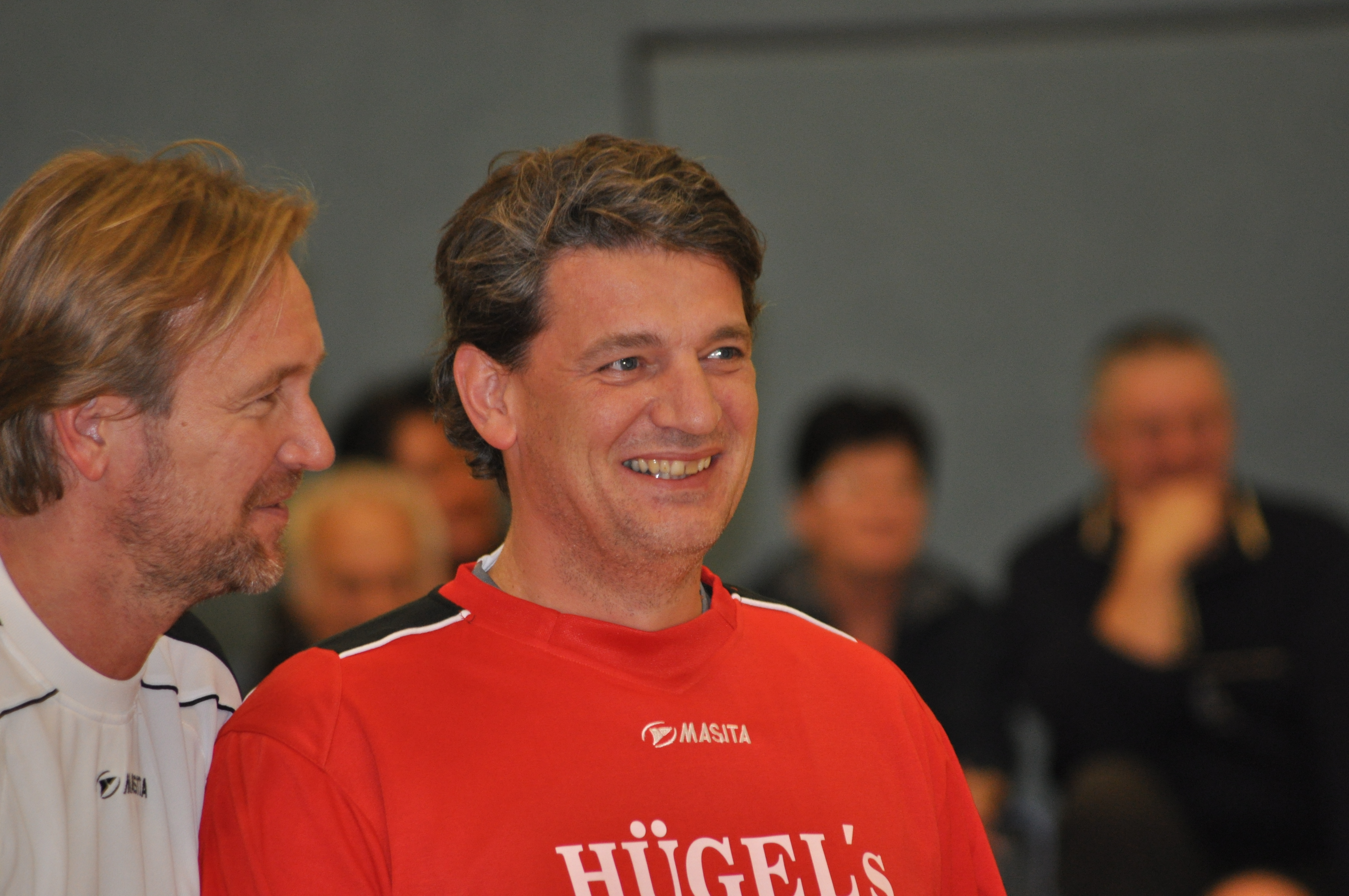 Jan Holpert am 10.12.2010 in der "Sporthalle am Mühlenberg" in Ribnitz-Damgarten bei einem Handballspiel zu Ehren des 70. Geburtstages des langjährigen Physiotherapeuten der (west)deutschen Männer-Handballnationalmannschaft Klaus Bergmeier. Hier mit Martin Schwalb.